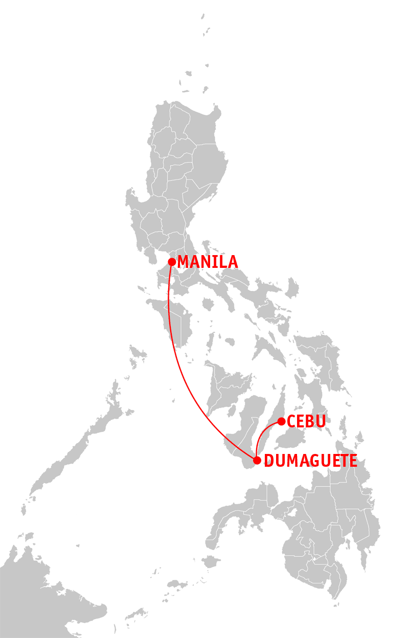 Dumaguete Airport destinations